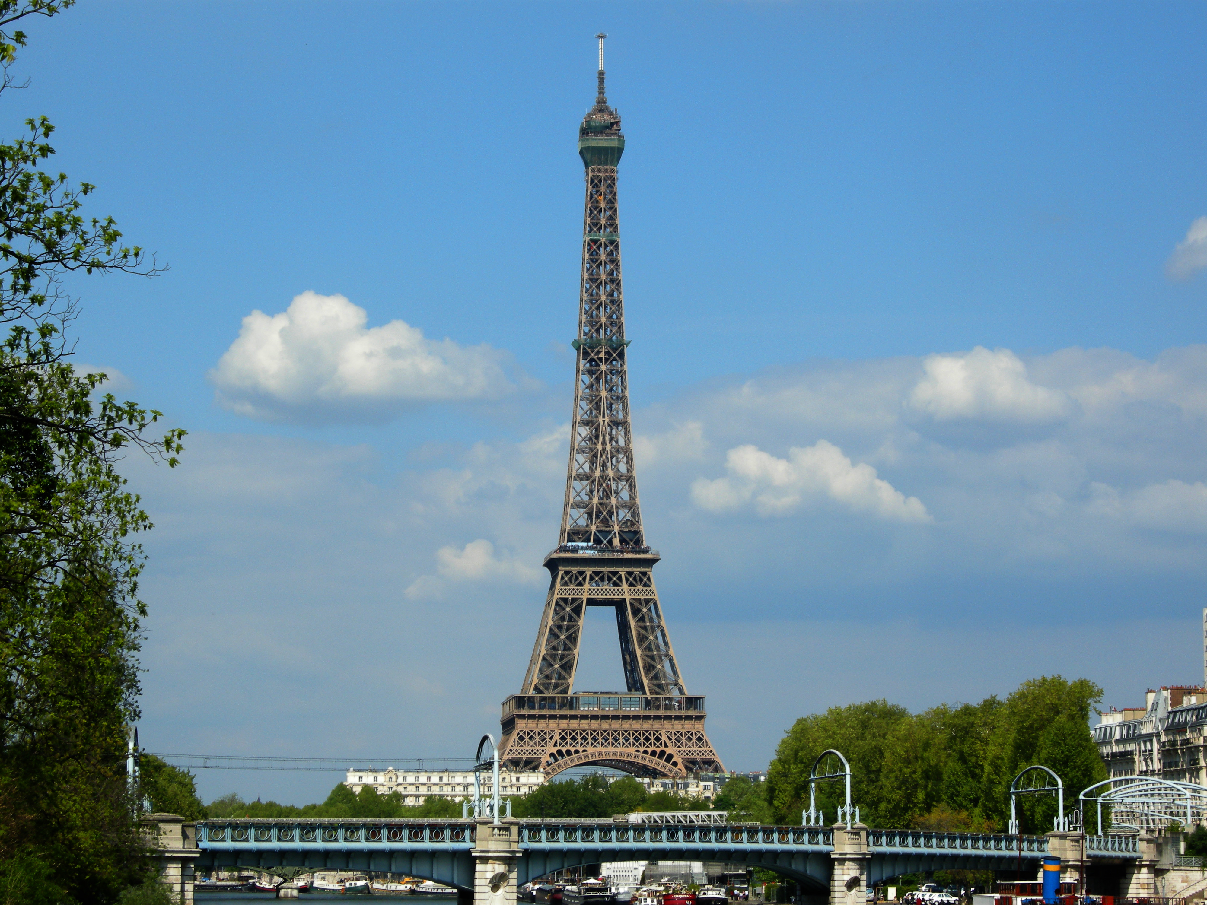 La VMI avec Tour Eiffel